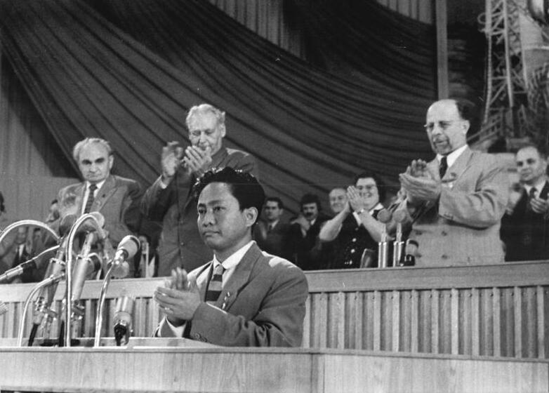 Zentralbild Ulmer 12.7.1958. V. Parteitag der SED vom 10. bis 16.7.1958 in der Werner-Seelenbinder-Halle, Berlin, 3. Tag: UBz: Eine beeindruckende Solidaritätsbekundung des Parteitages für die konsequent- und erfolgreich für die volle Gewährleistung der Unabhängigkeit ihres Landes kämpfenden Kommunisten Indonesien erlebte die Werner-Seelenbinder-Halle während der Grussansprache des Generalsekretärs der KP Indonesiens, D. N. Aidit.